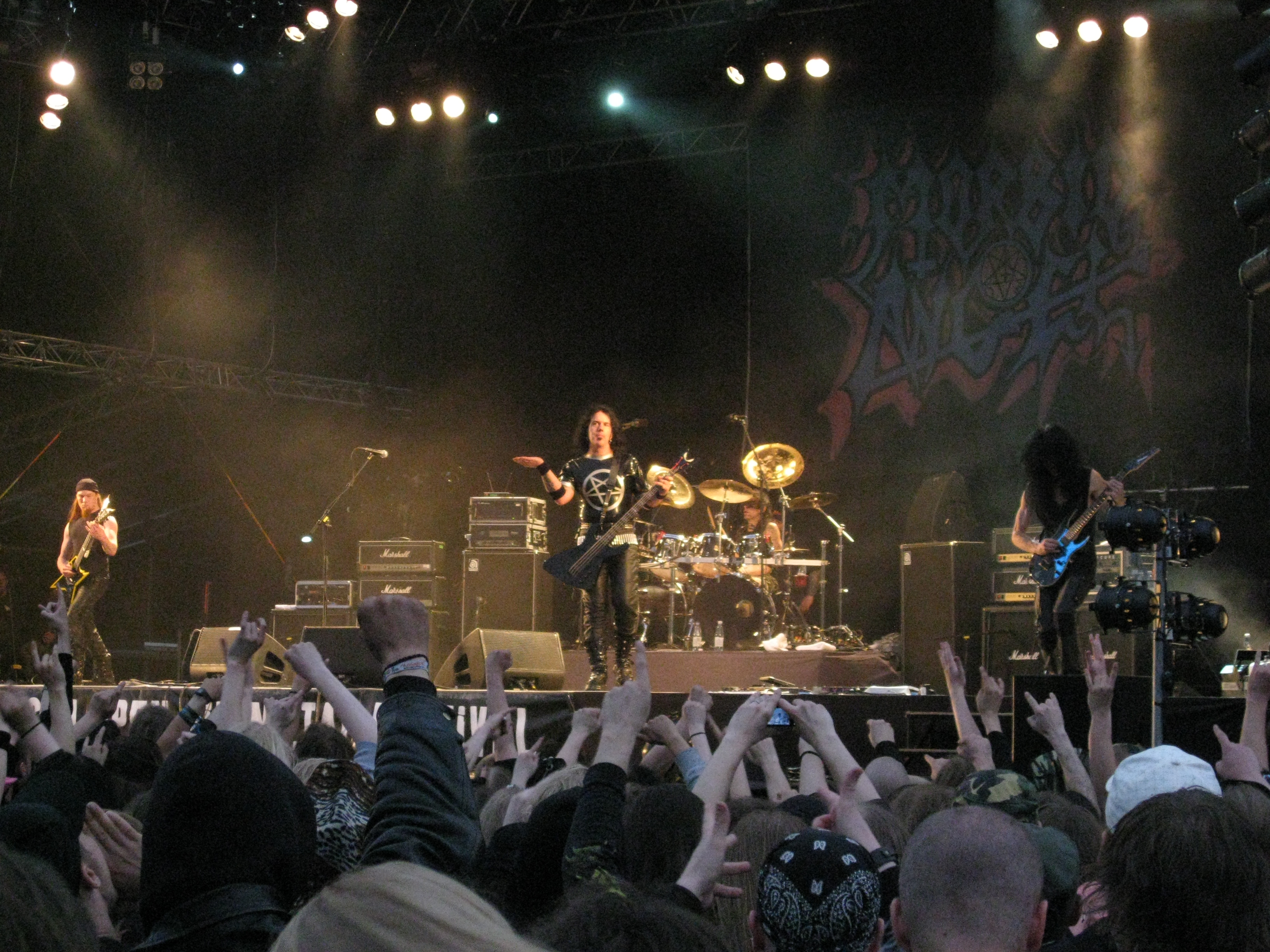 Morbid Angel at Tuska Open Air